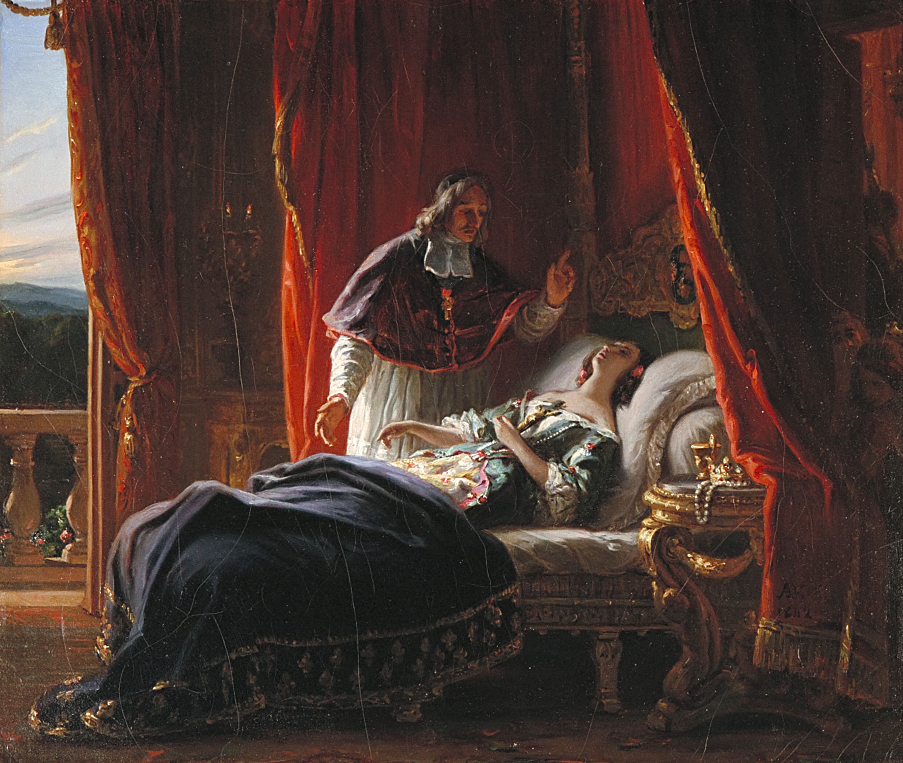 La mort de Madame, duchesse d’Orléans (Henriette-Anne d’Angleterre, 1644-1670)